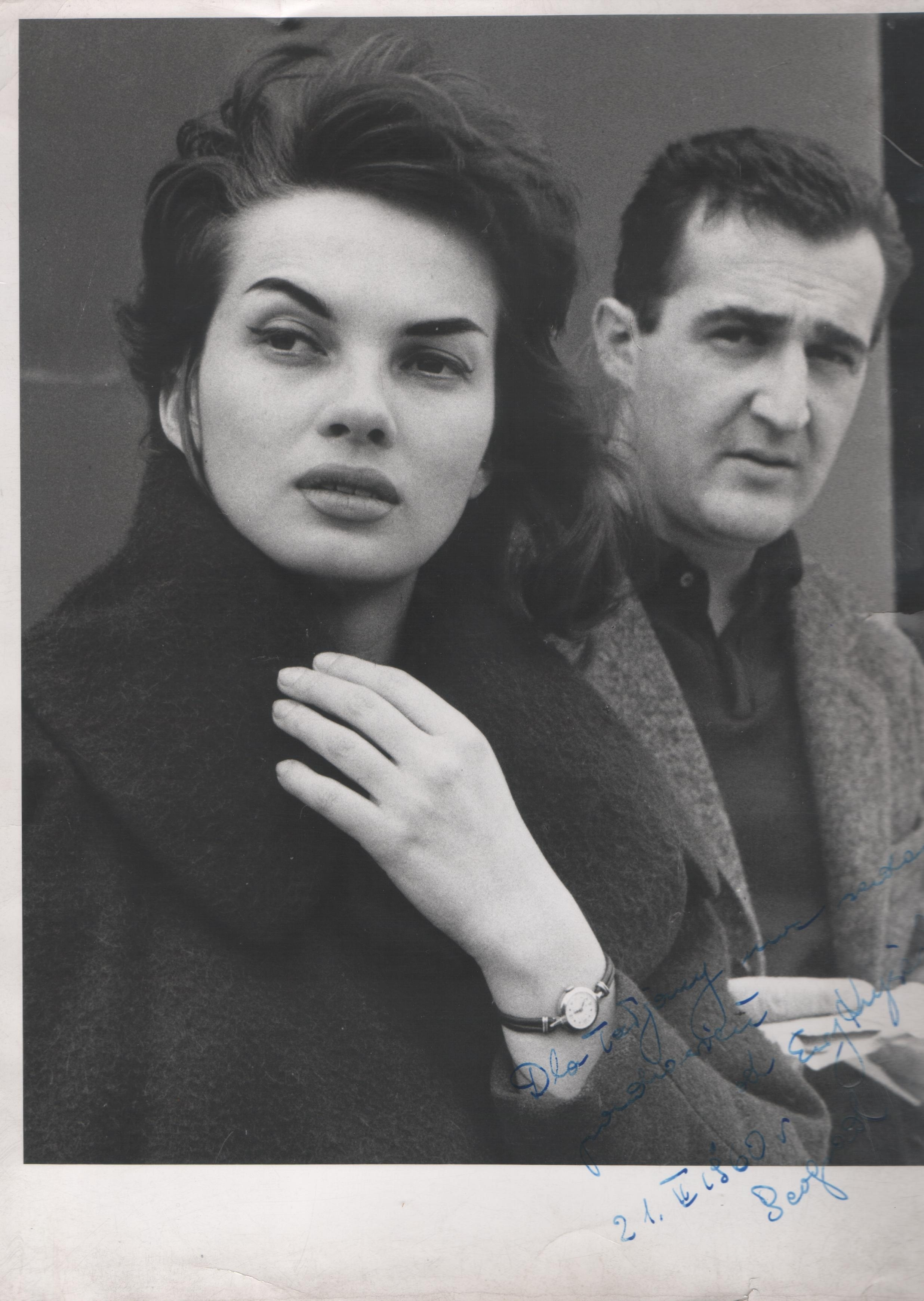 Veljko Bulajić i Ewa Krzyzewska, poljska glumica 1960. godine na snimanju filma Rad. foto: Stevan Kragujević (po odobrenju kćerke Tanje Kragujević)